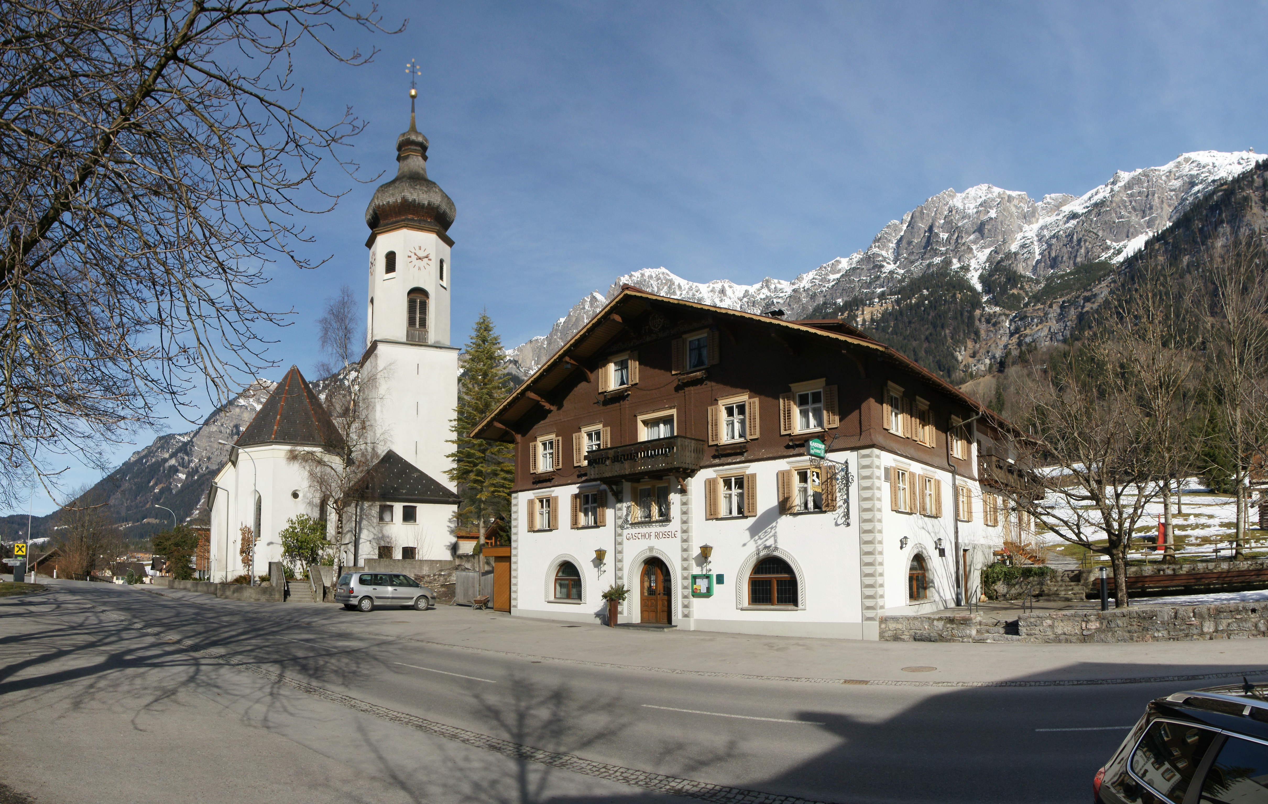 Kirche "hl. Nikolaus" in Innerbraz und das Gasthaus Rössle.